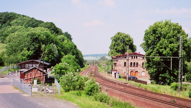 Bahnhof (re) und Güterbahnhof (li) (bzw. der Rest davon) in Arenshausen, Thüringen - Arenshausen railway station, Thuringia, Germany